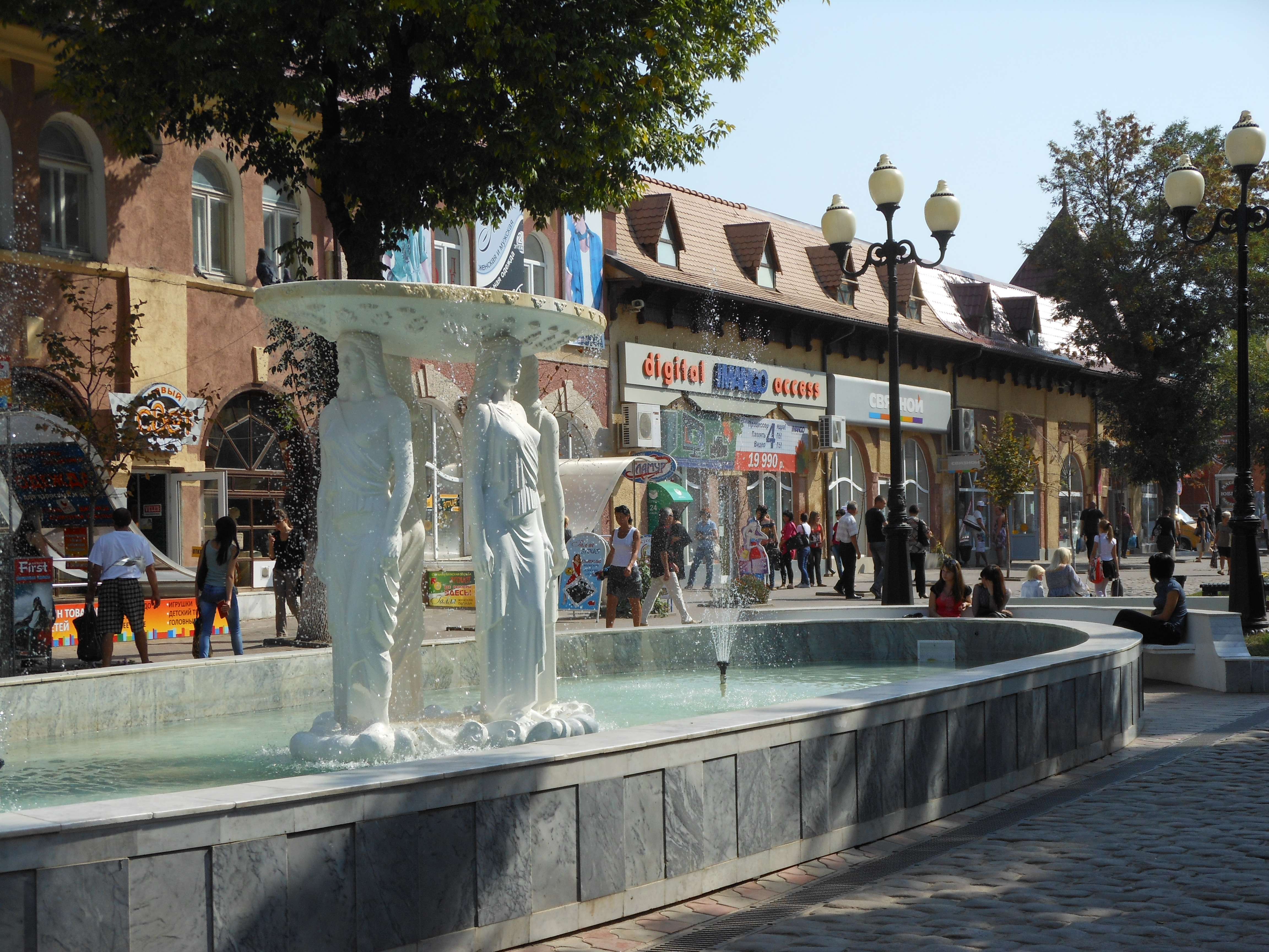 Россия, Ейск, Гостинный двор, Центр, Сейчас - торговый центр, рынок. Сентябрь 2012г